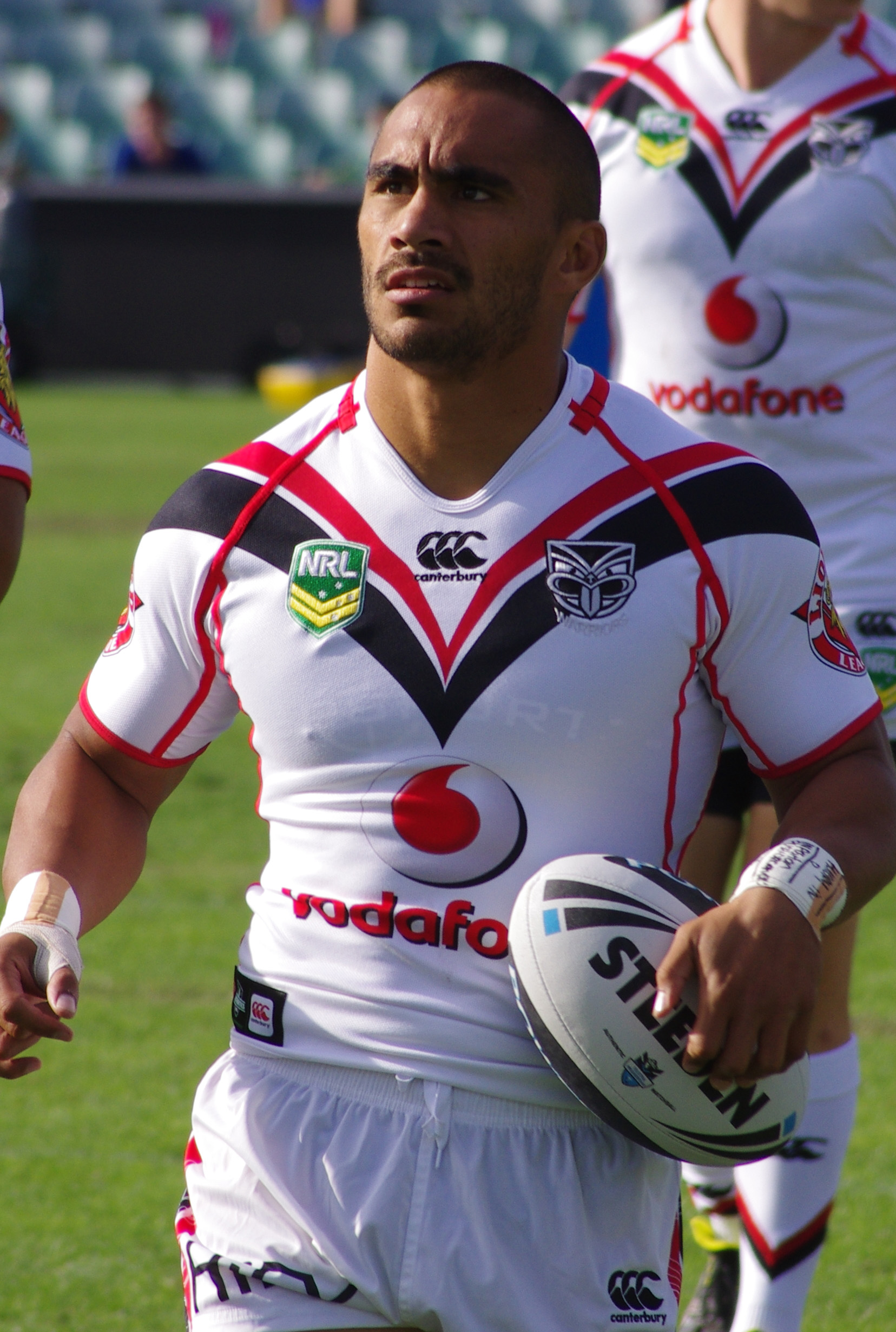 THOMAS LEULUAI